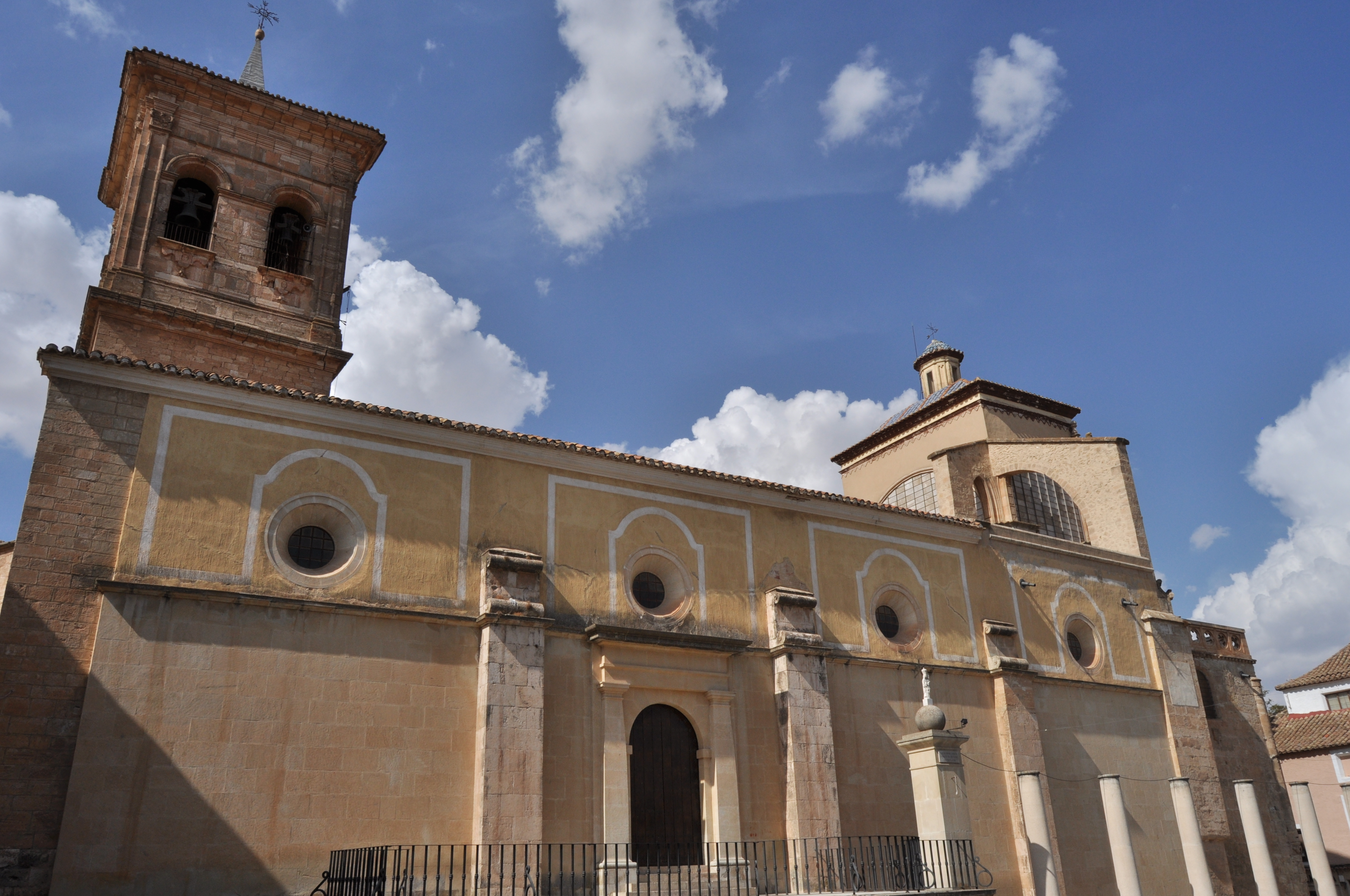 Chinchilla de Montearagon - 014